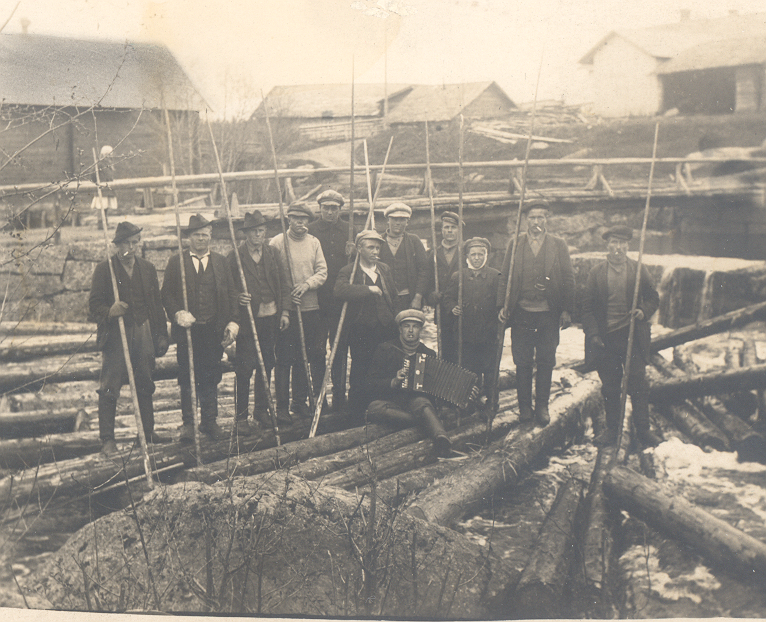 Kuvassa on Vaalimaanjoessa tapahtuneeseen tukinuittoon osallistuneita uittomiehiä Mattilankoskella. Miesten takana näkyy myllyn kivinen suistepato ja Mattilankosken ylittävä maantiesilta. Sillan takana näkyy vasemmalla osa myllyrakennusta ja taustalla muita talousrakennuksia. Kuvan on ottanut 17.6.1923 Muurikkalasta kotoisin oleva Oskar Mäkinen.